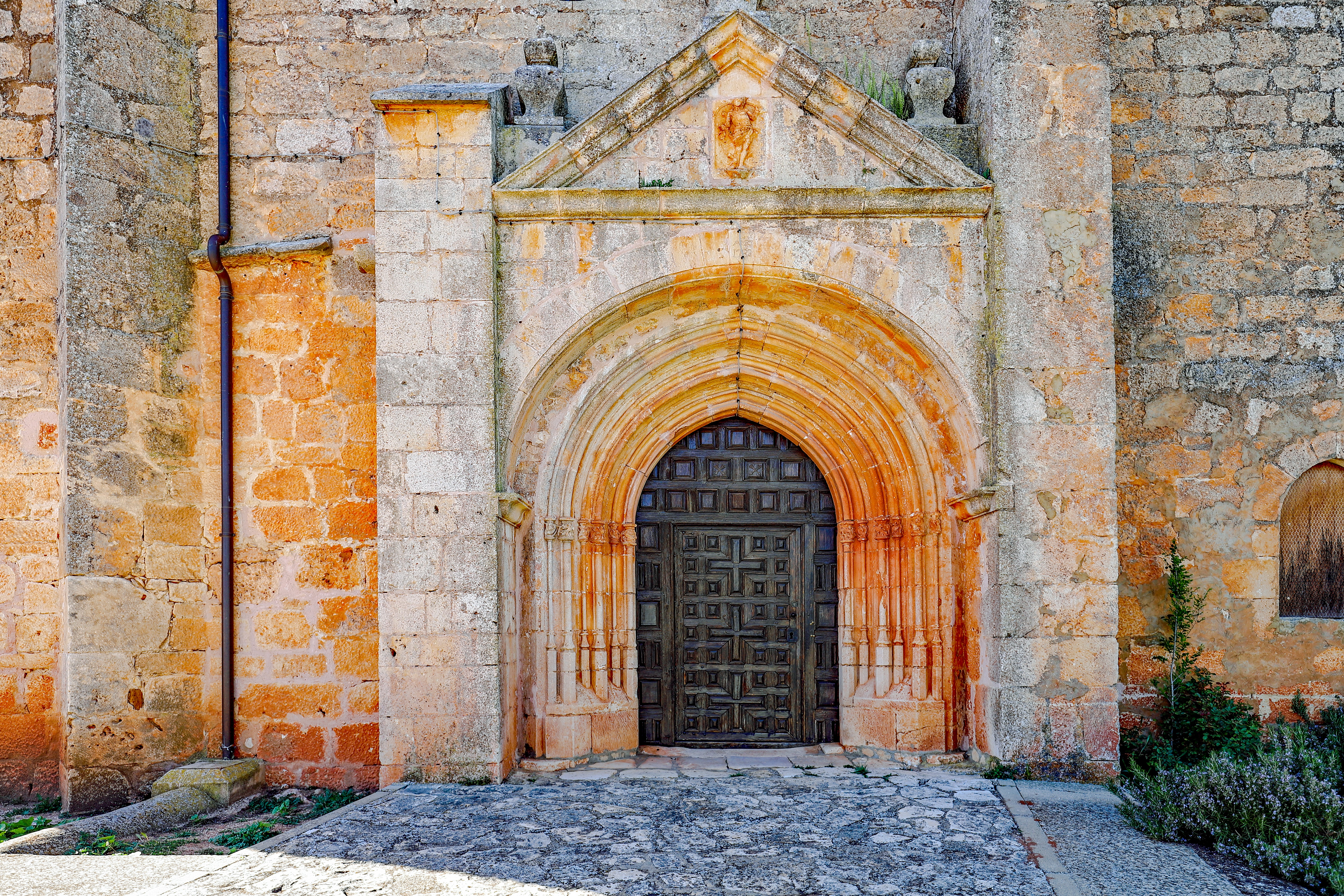 Ciruelos de Cervera es un municipio de la comarca de Arlanza, en la provincia de Burgos.